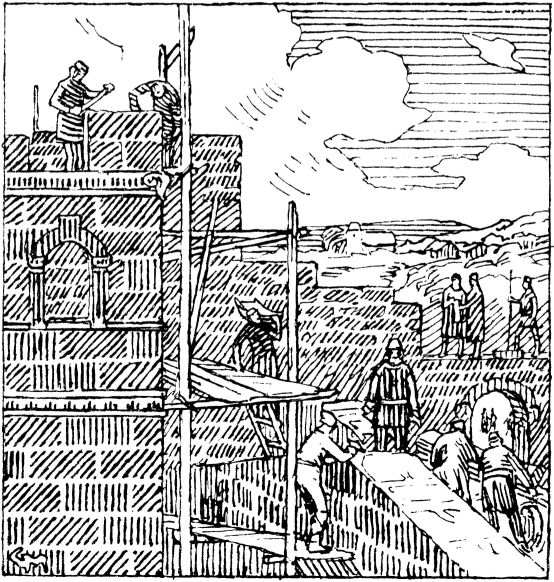 Gerhard Munthe: Illustration for Magnussønnens saga. Snorre 1899-edition. nn: «Kong Øystein byggjer.» nb: «Kong Øystein bygger.»